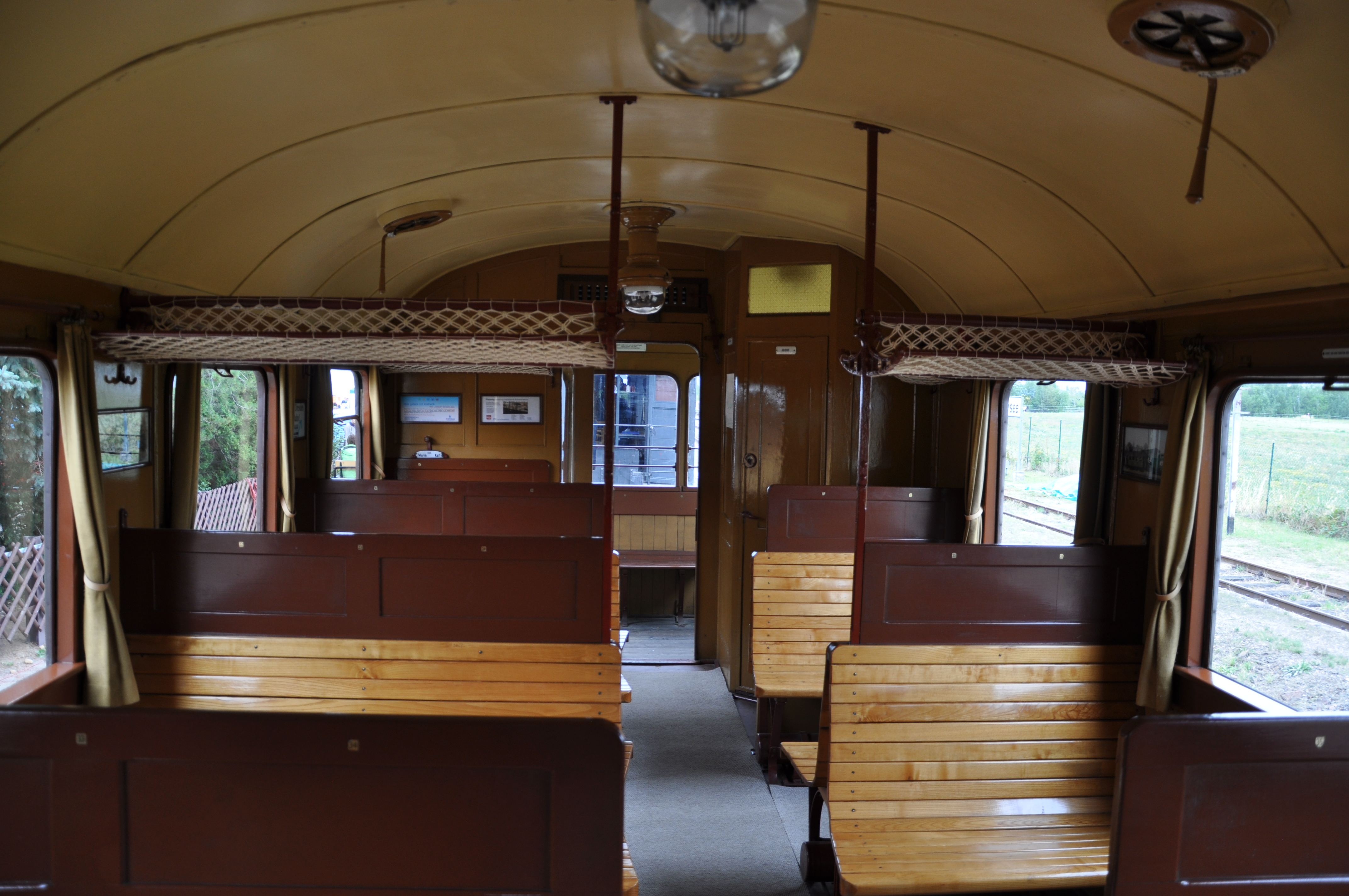 Museumswagen C Sa 12 („Windbergaussichtswagen“) des Windbergbahn e.V., Fahrgastraum